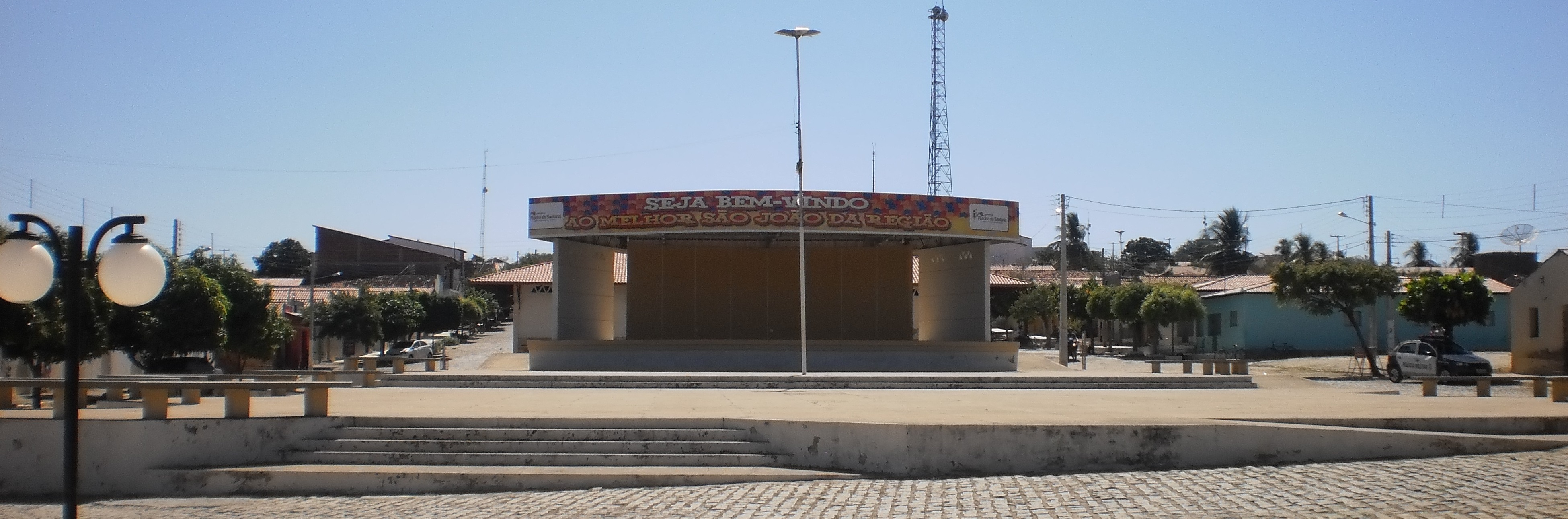 Praça de Eventos de Riacho de Santana - Rio Grande do Norte, Brasil.